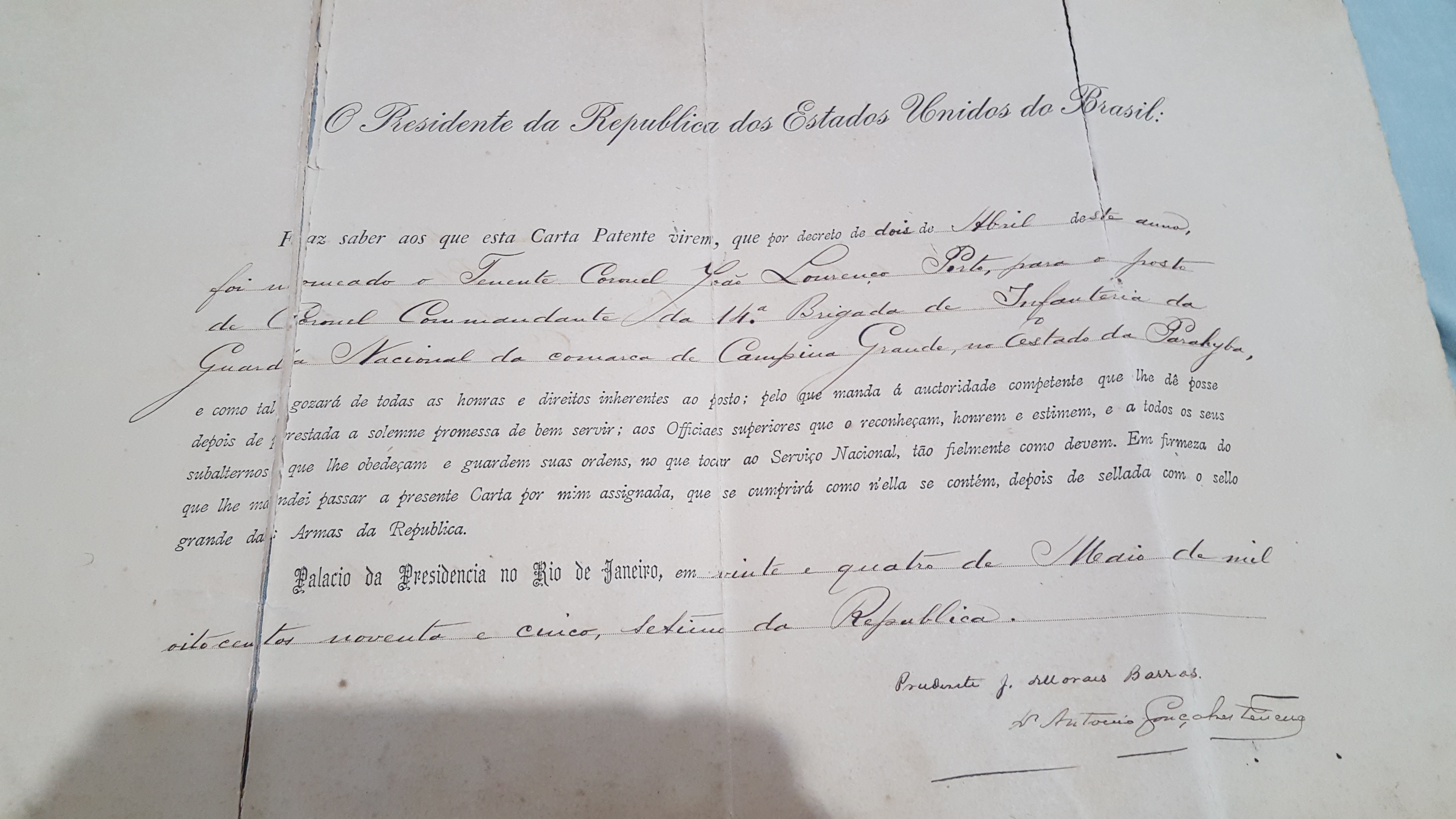 CARTA PATENTE QUE NOMEOU JOÃO LOURENÇO PORTO CORONEL COMANDANTE DA GUARDA NACIONAL NA REGIAO DE CAMPINA GRANDE PB, DE LAVRA DO ENTÃO PRESIDENTE PRUDENTE DE MORAIS.